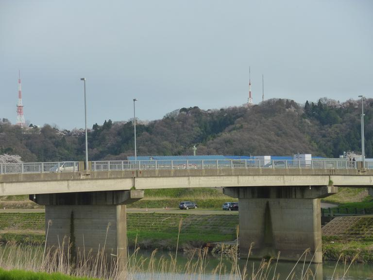 新明里橋（福井市）